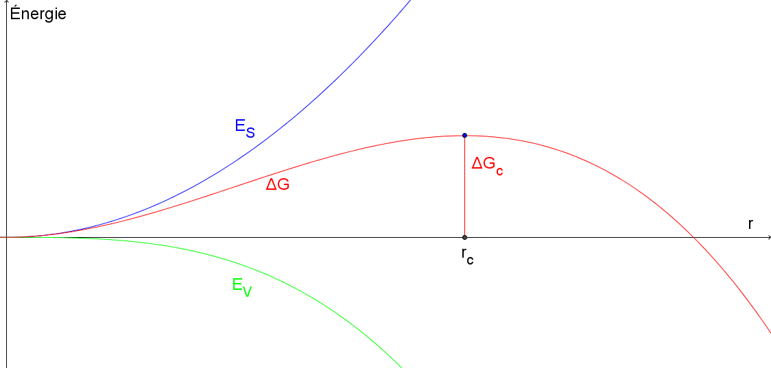 ΔG(r)=?